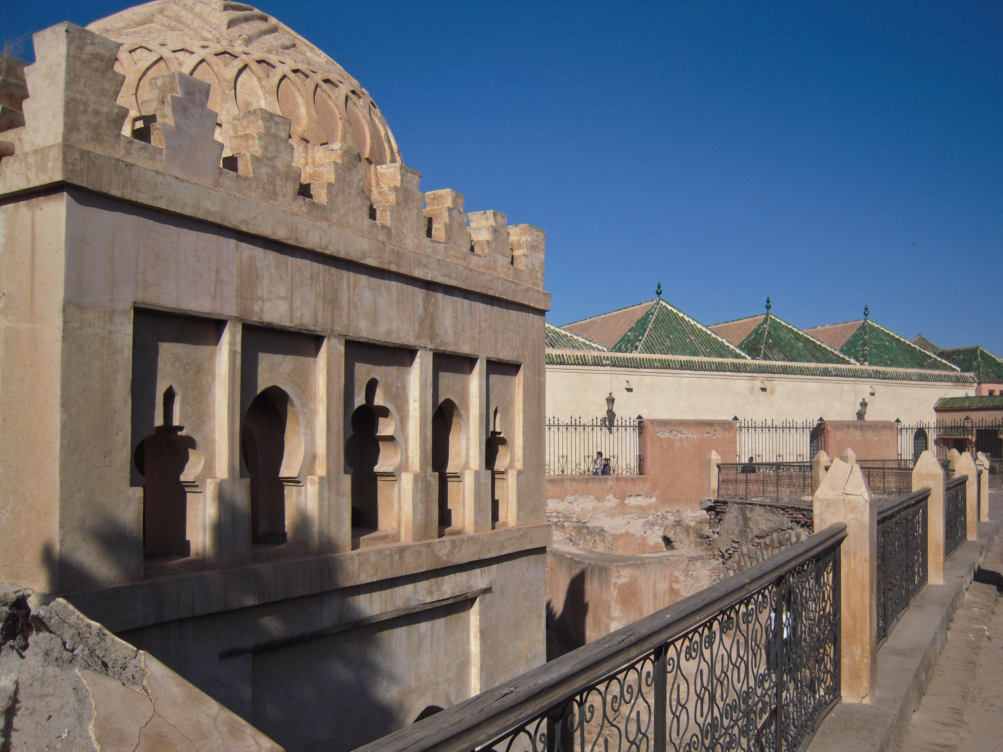 Marrakesh, Almoravid Koubba